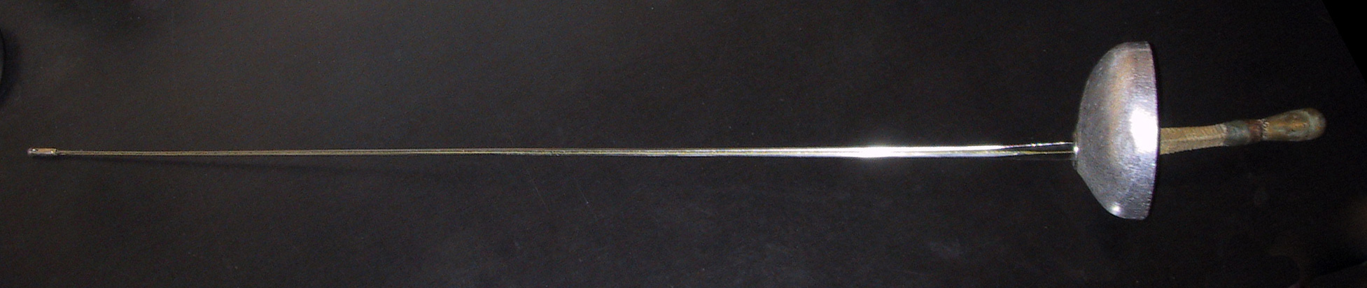 Épée d'escrime moderne sur fond noir. Auteur: Cédric Filhol Source: J'ai pris cette photo moi-même.